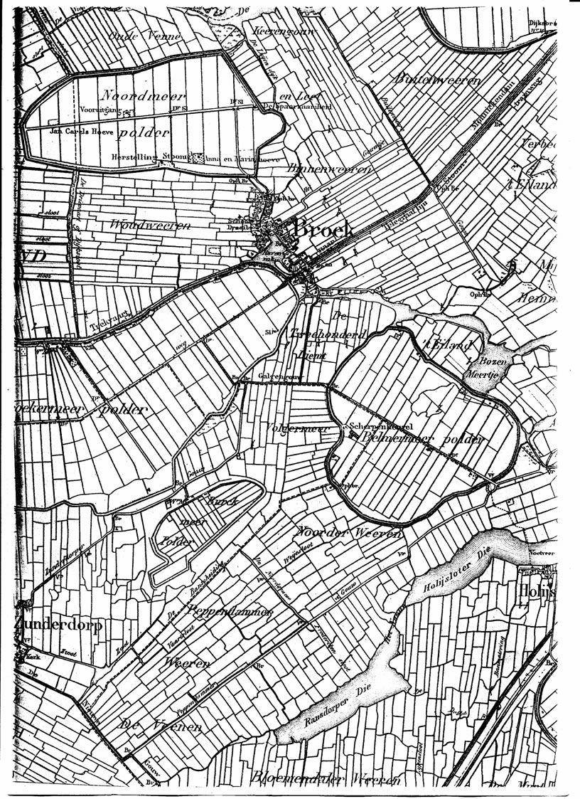 Volgermeerpolder